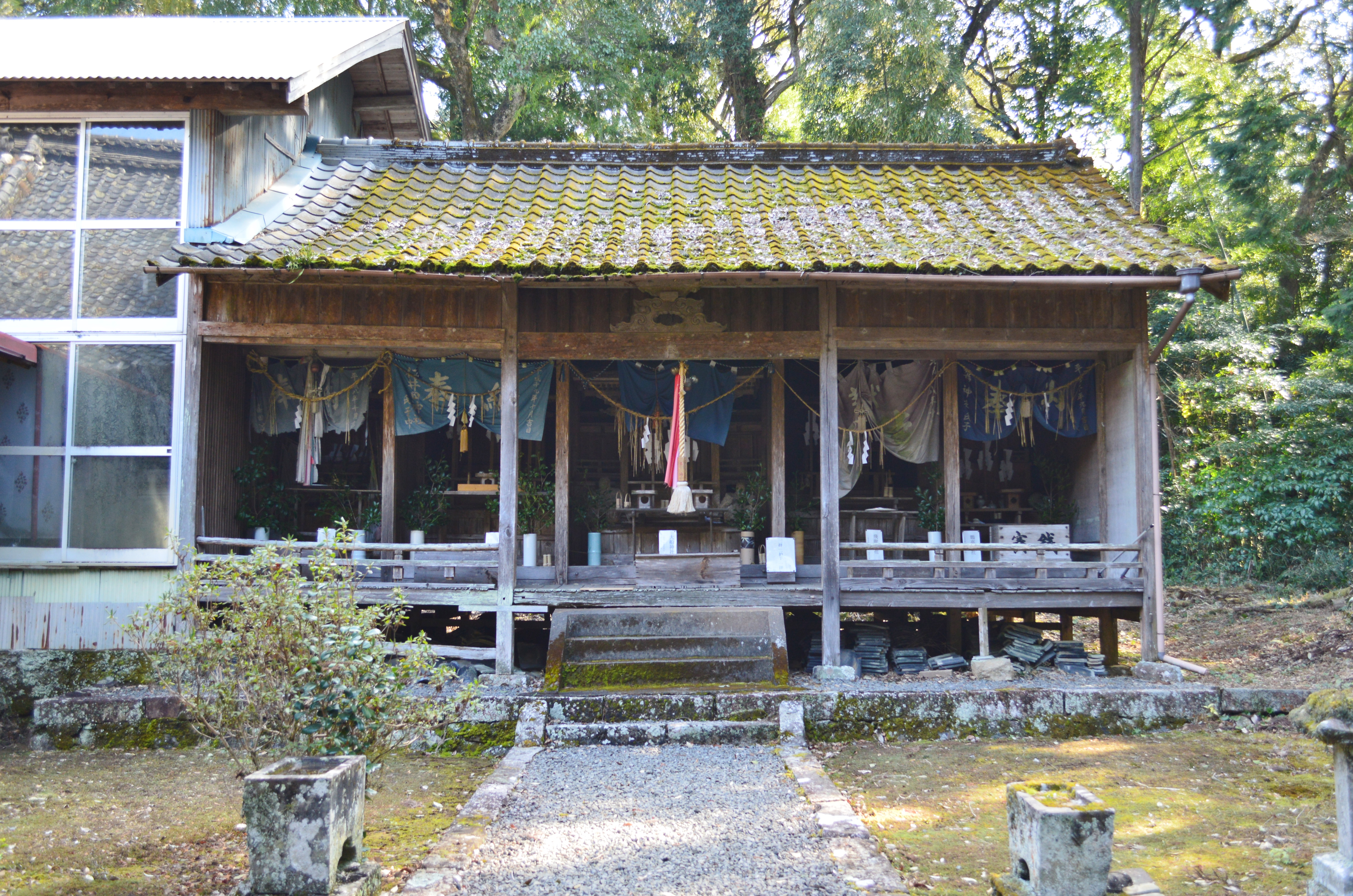 高知坐神社 境内社右宮